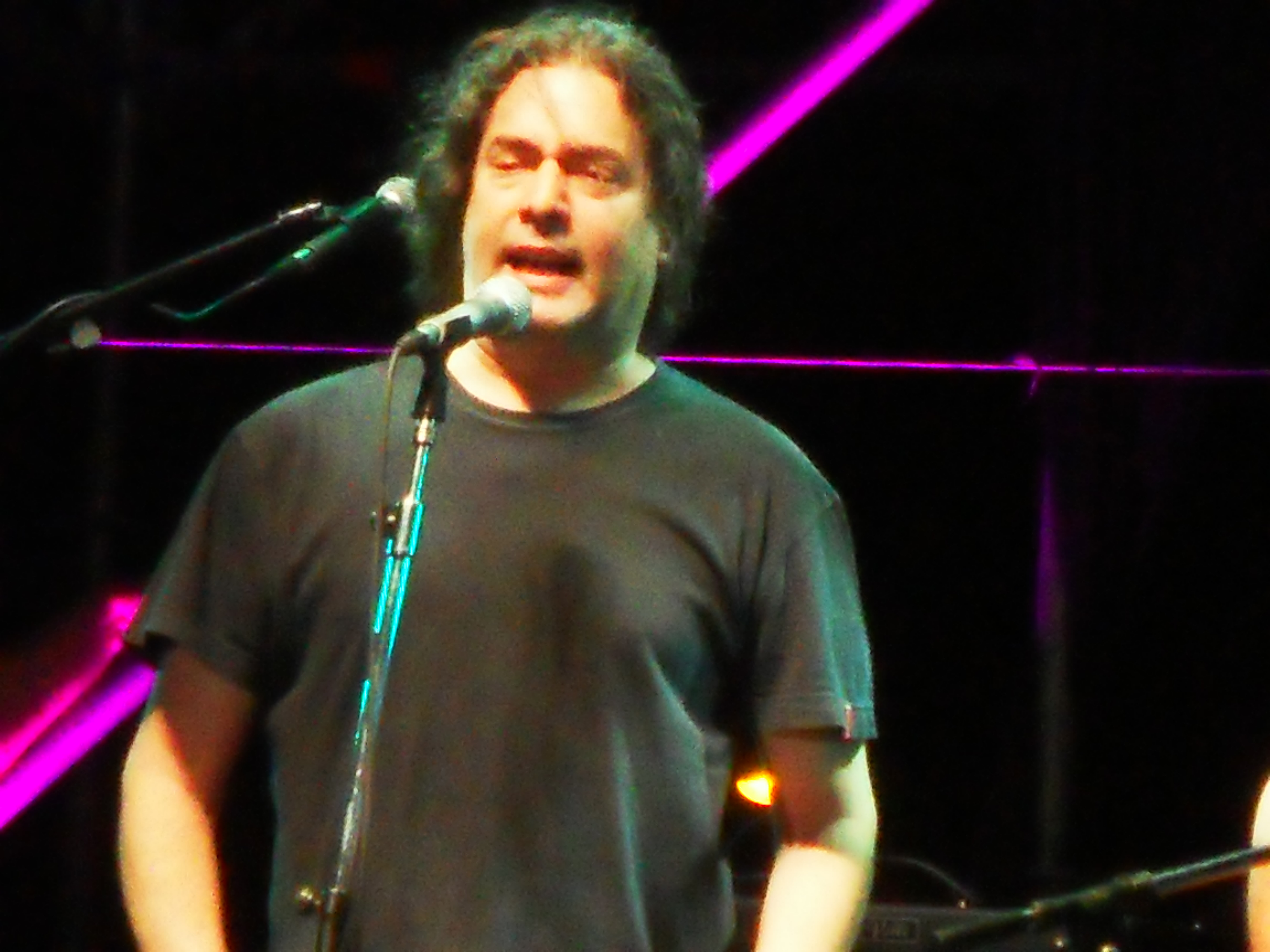 Fernando Barrientos en escena